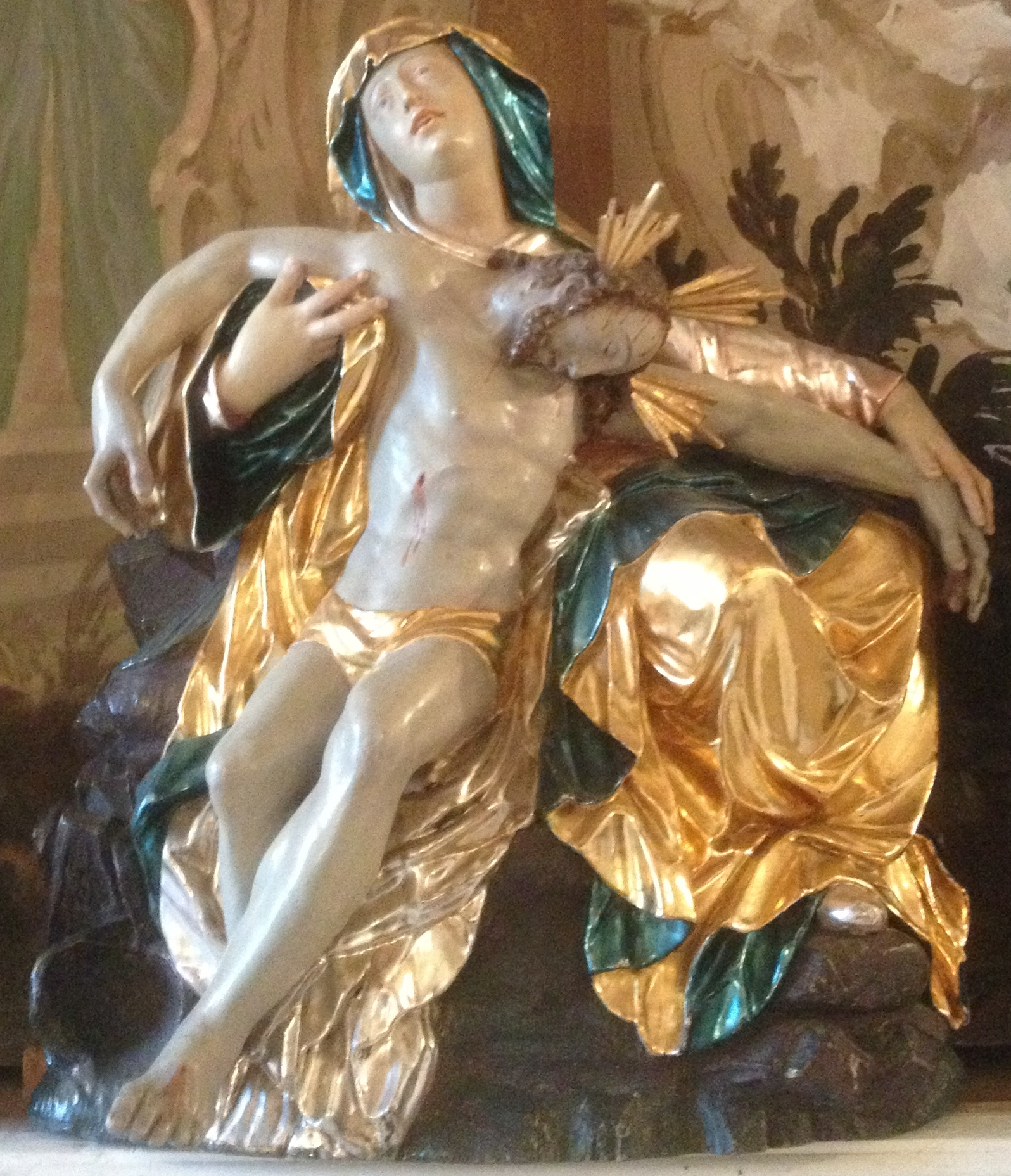 Maria mit Christus nach der Kreuzigung. Die Statue stammt aus dem Kloster Lindenau und befindet sich heute in der Sakristei der Klosterkirche Elchingen. Sie wird während der Prozession "Hoher Umgang" in der Kirche gezeigt.